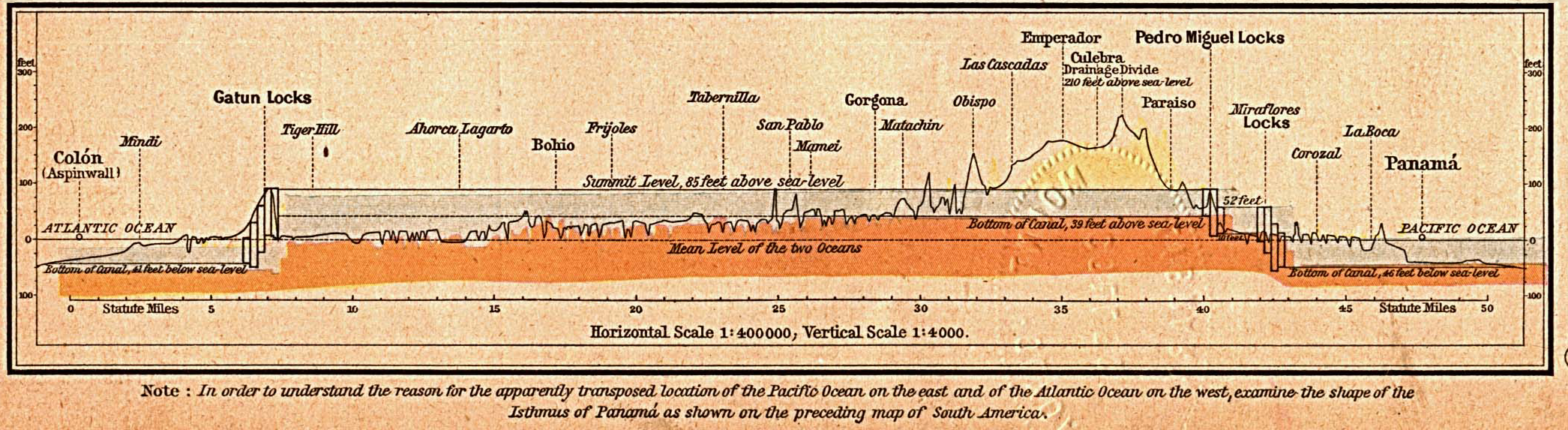 Panama canal